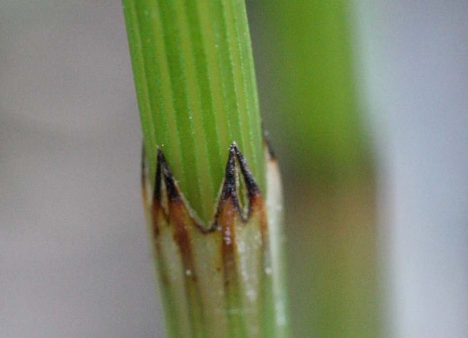 Equisetum_arvense (Equiseto dei campi) Località : Le Laste, Limana (BL), 661 m s.l.m.